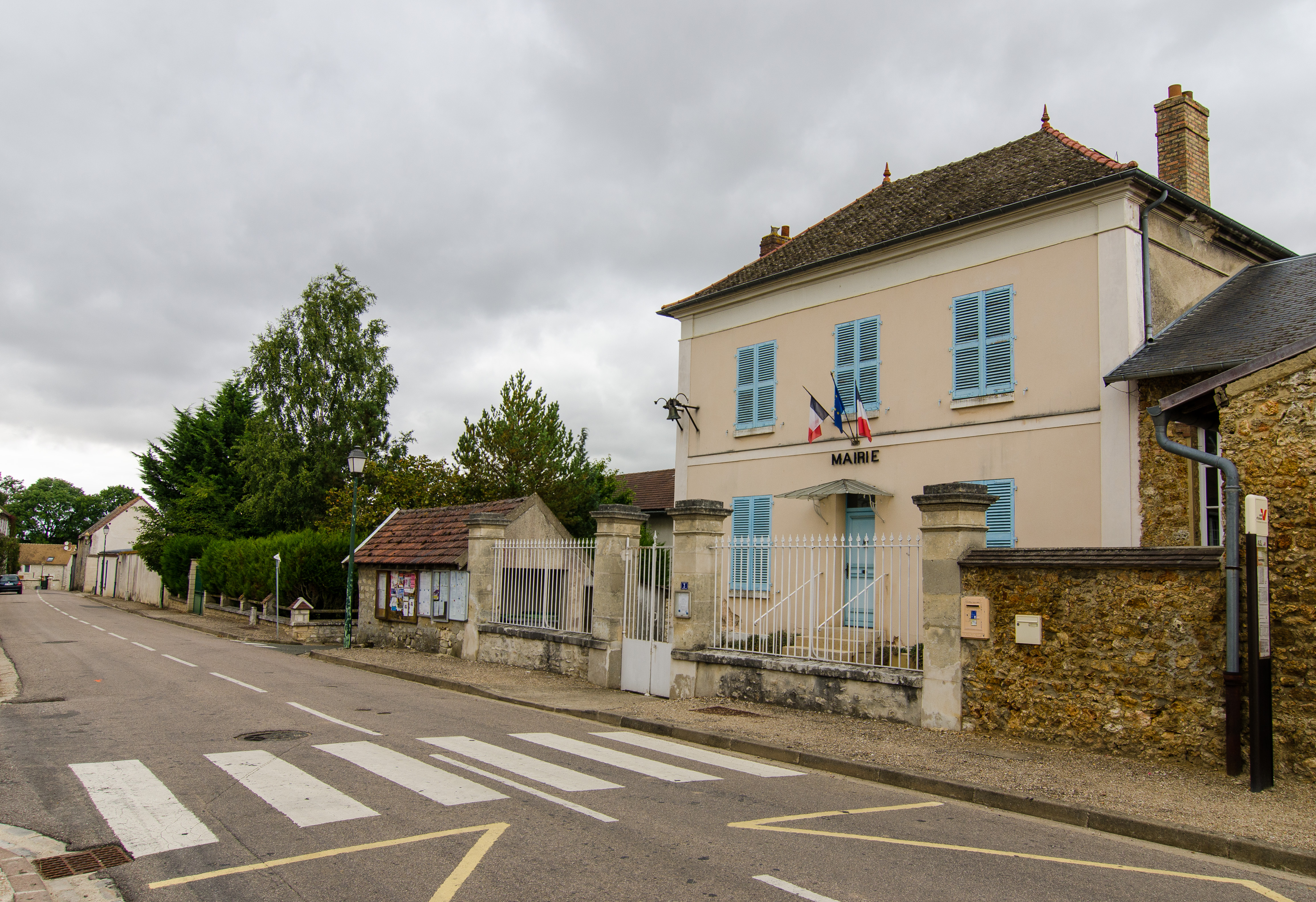 Rue de la Mairie.